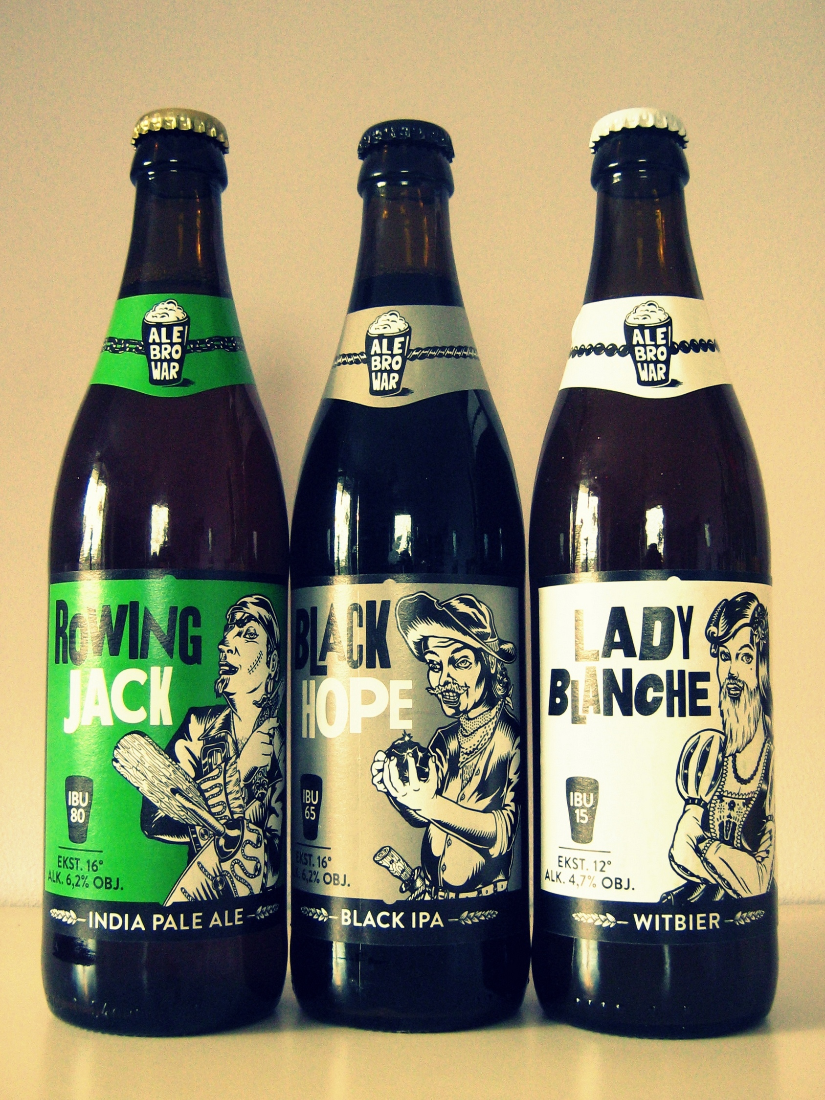 Pierwsze piwa z browaru kontraktowego AleBrowar